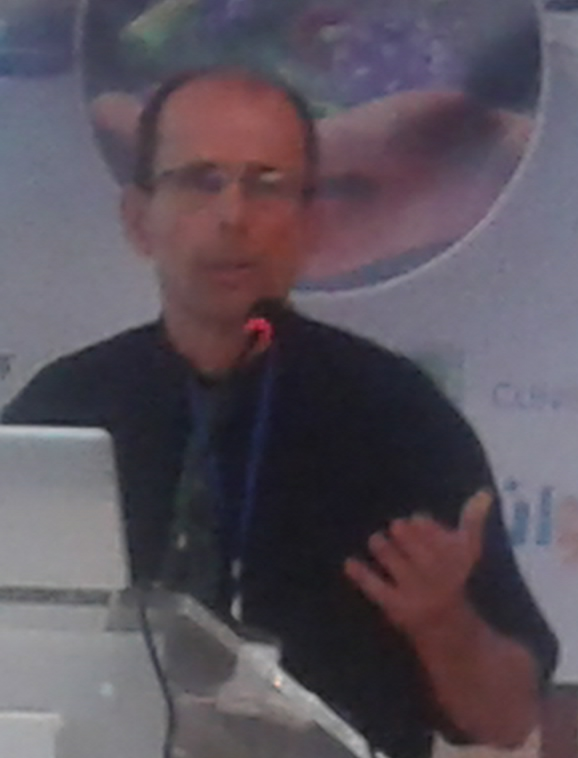 C'est le professeur Philippe Cinquin lors de la présentation de ses travaux durant la conférence internationale ESBM 2017 tenue à Sfax en mai 2017.